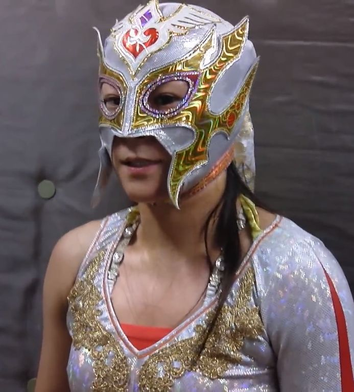 REINA女子プロレス・Ray